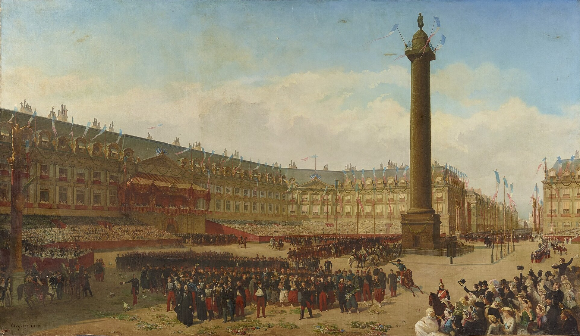 Rentrée triomphale à Paris de l'armée d'Italie, 14 août 1859. Retour de l'armée de Napoléon III d'Italie après les victoires contre l'Empire d'Autriche (Magenta, Solférino). Dimensions : œuvre: 244 x 413,5 cm. Matière et technique : huile sur toile.